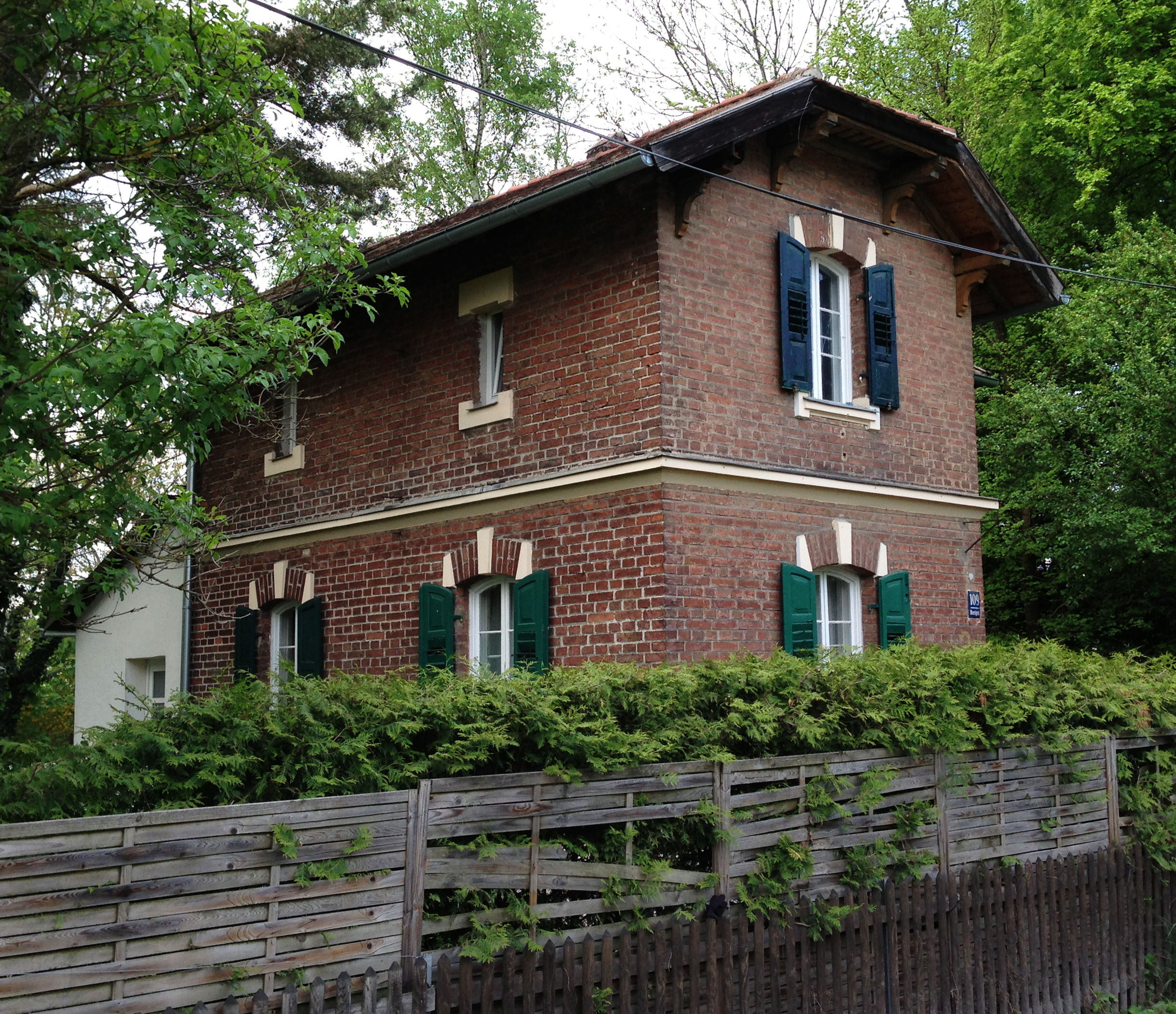 Borsigstr. 109, München